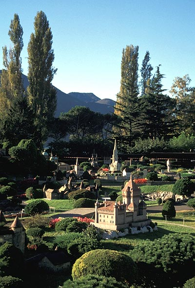 Übersicht Swissminiatur